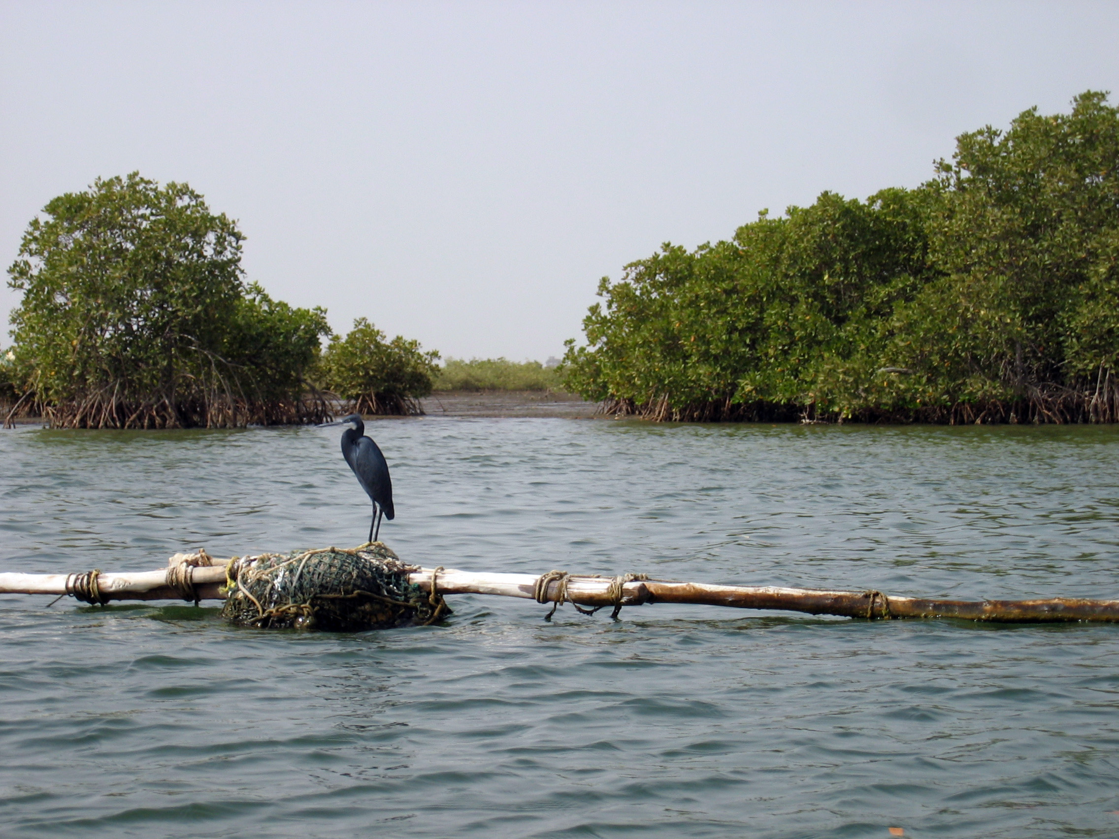 Aigrette des récifs, Western Reef-heron, Egretta gularis dans le Parc national du delta du Saloum (Sénégal). Identification by :en users Jimfbleak and MeegsC.